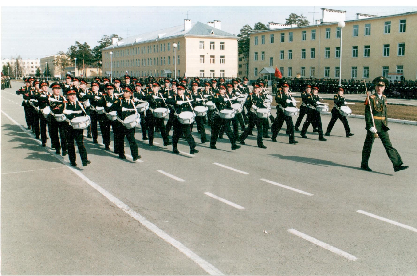 Коробка барабанщиков,3 рота суворовцев 28.04.2006,командир парадной роты,подполковник Зайцев.Репетиция в 32 военном городке